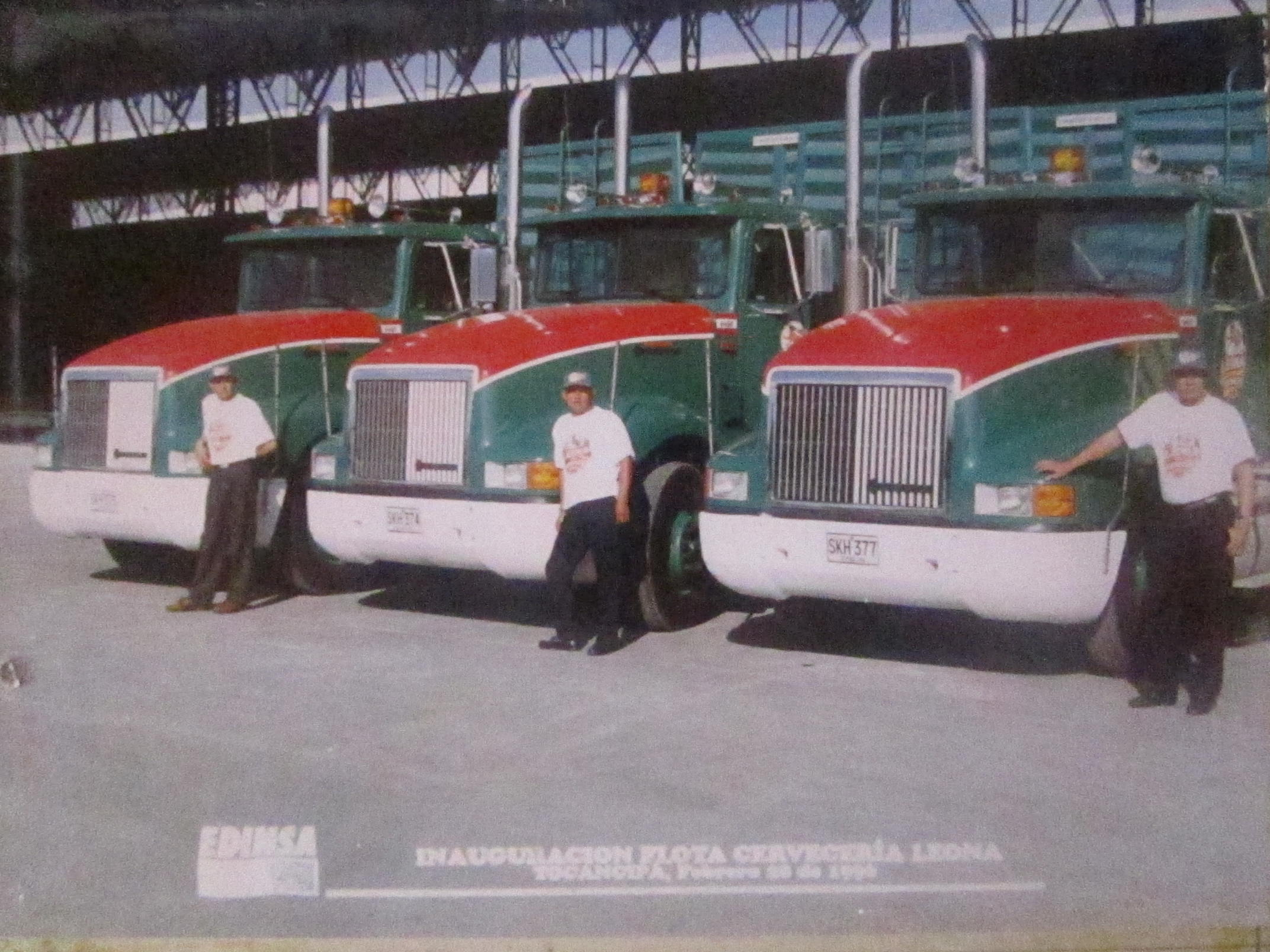 Inaguracion Tractomulas 1996.